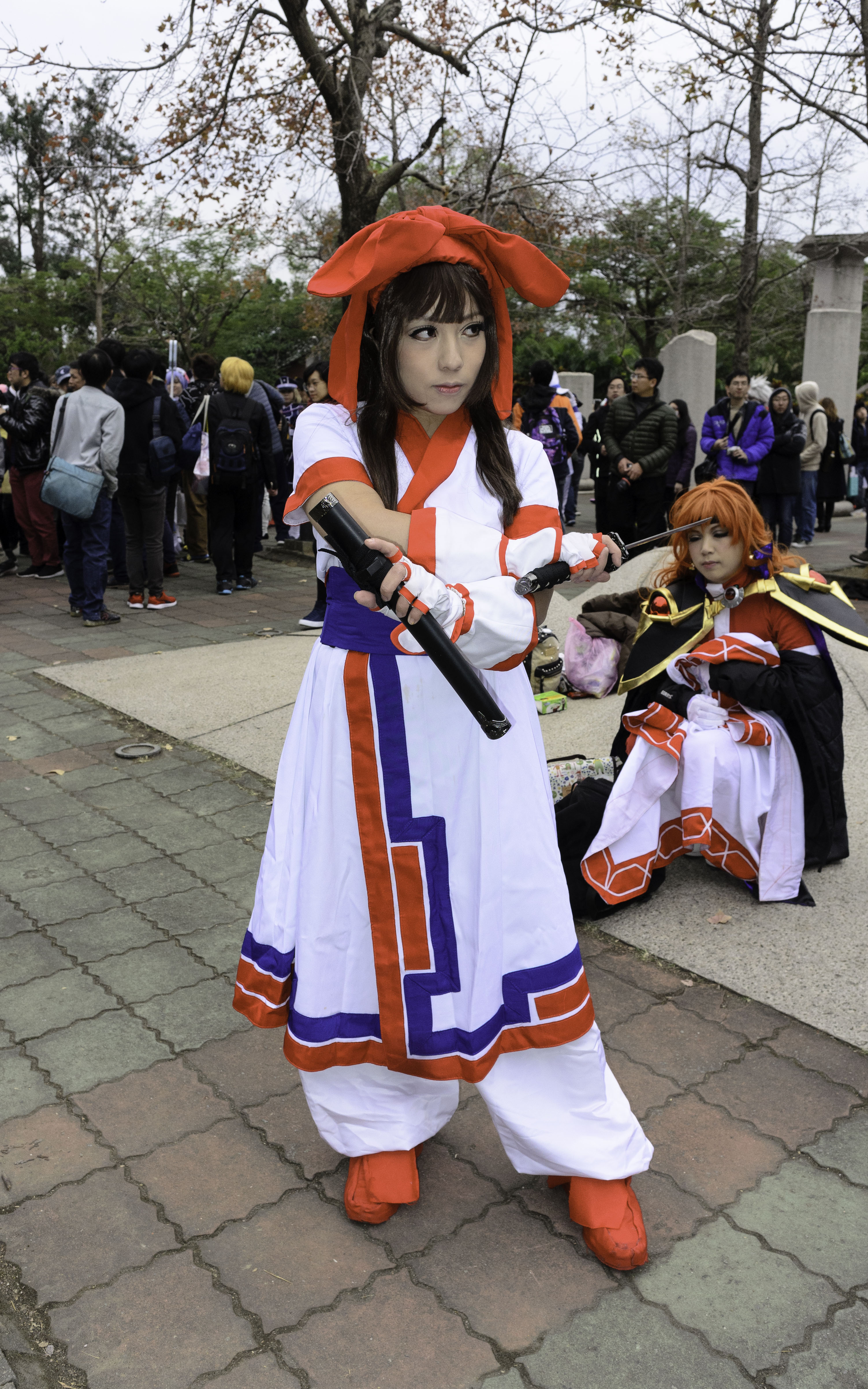 第29屆開拓動漫祭，《侍魂系列》娜考露露（中）、《秀逗魔導士》莉娜·因巴斯（右）cosplayer。